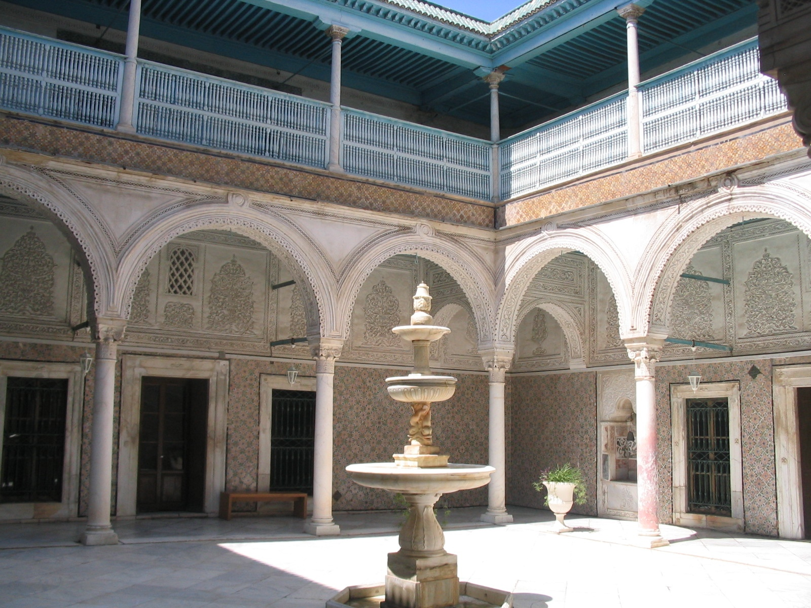 Dar Ben Abdallah (Tunis)